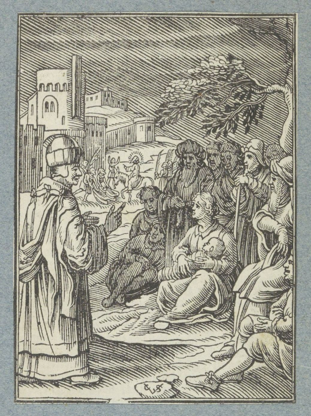 IdentificatieTitel(s): Profetie van ZachariaObjecttype: prent boekillustratie albumblad Objectnummer: RP-P-2015-17-128-4Omschrijving: Zacharia zegt in opdracht van de Heer tegen het volk dat zij naar Hem moeten terugkeren. Op de achtergrond zijn profetie van de intocht van de koning in Jeruzalem. De prent maakt deel uit van een album.VervaardigingVervaardiger: prentmaker: Christoffel van Sichem (II) (vermeld op object)prentmaker: Christoffel van Sichem (III) (vermeld op object)uitgever: Pieter Jacobsz. PaetsPlaats vervaardiging: AmsterdamDatering: 1645 - 1646Fysieke kenmerken: houtsnede bevestigd aan albumbladMateriaal: papier Techniek: houtsnede / plakkenAfmetingen: beeld: h 110 mm × b 79 mmToelichtingDe prent werd gemaakt voor de uitgaven van P.J. Paets uit Amsterdam. Ze komt in ieder geval voor in: Bibels Tresoor ofte der zielen lusthof. Amsterdam, P.J. Paets, 1646. Mogelijk ook in: Historien ende Prophetien. [Amsterdam], P.J. Paets, 1645.OnderwerpWat: Zechariah is called by the Lord to prophesy (Zechariah 1:1)prophecy of the King coming to Jerusalem, riding on an ass (Zechariah 9:9)entry into Jerusalem: people spreading their clothes before Christ on the ass, and waving palm branches (Matthew 21:1-11, 21:14-16; Mark 11:1-11; Luke 19:28-40; John 12:12-19)Verwerving en rechtenVerwerving: onbekend 1936Copyright: Publiek domein